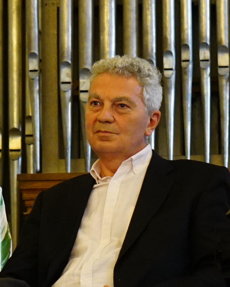 Lors du colloque international sur la paix en l'hôtel de ville de Reims.